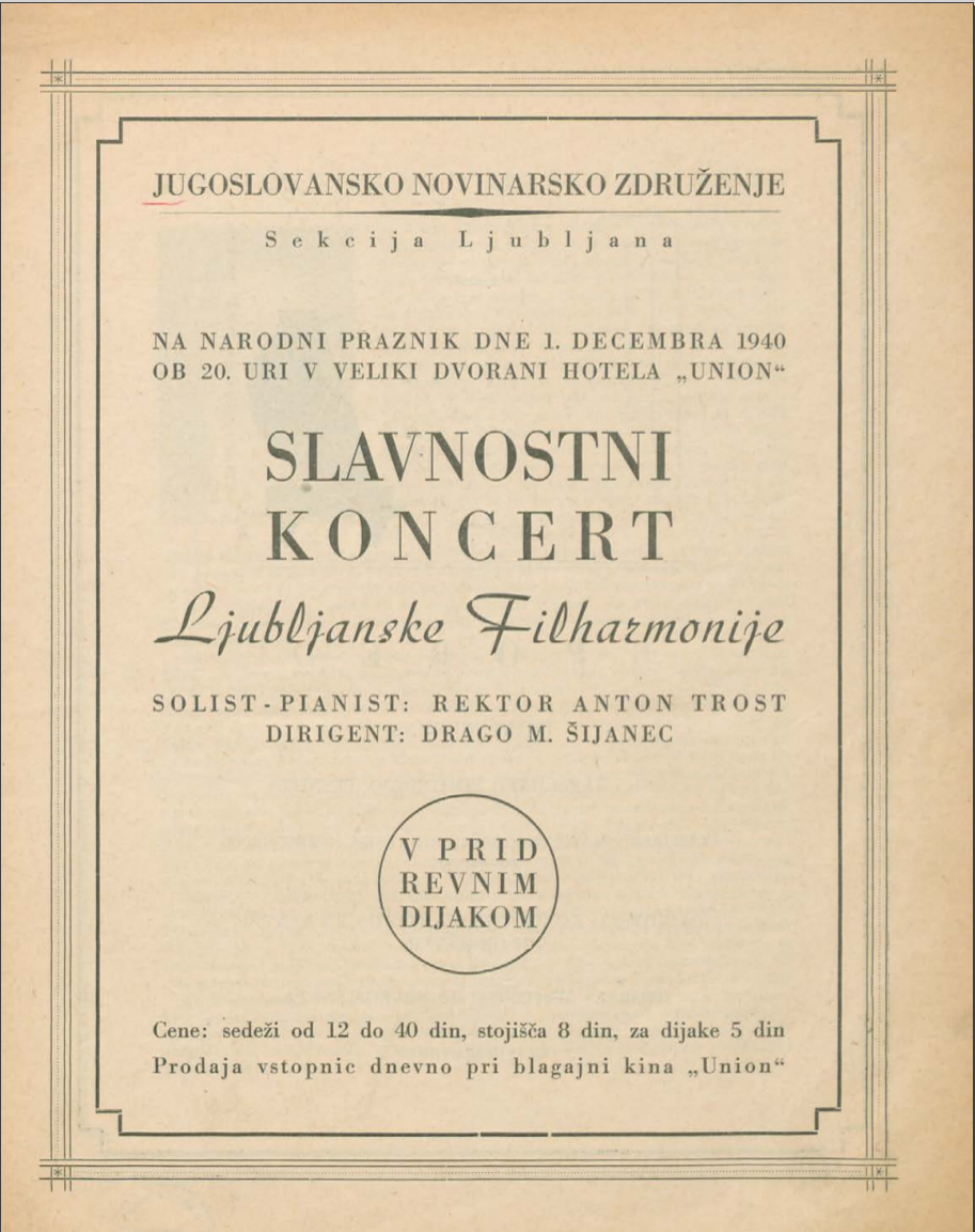 Programa "Concierto Eslavo" de la Filarmónica de Ljubliana dirigida por Drago Mario Sijanec. c.1940